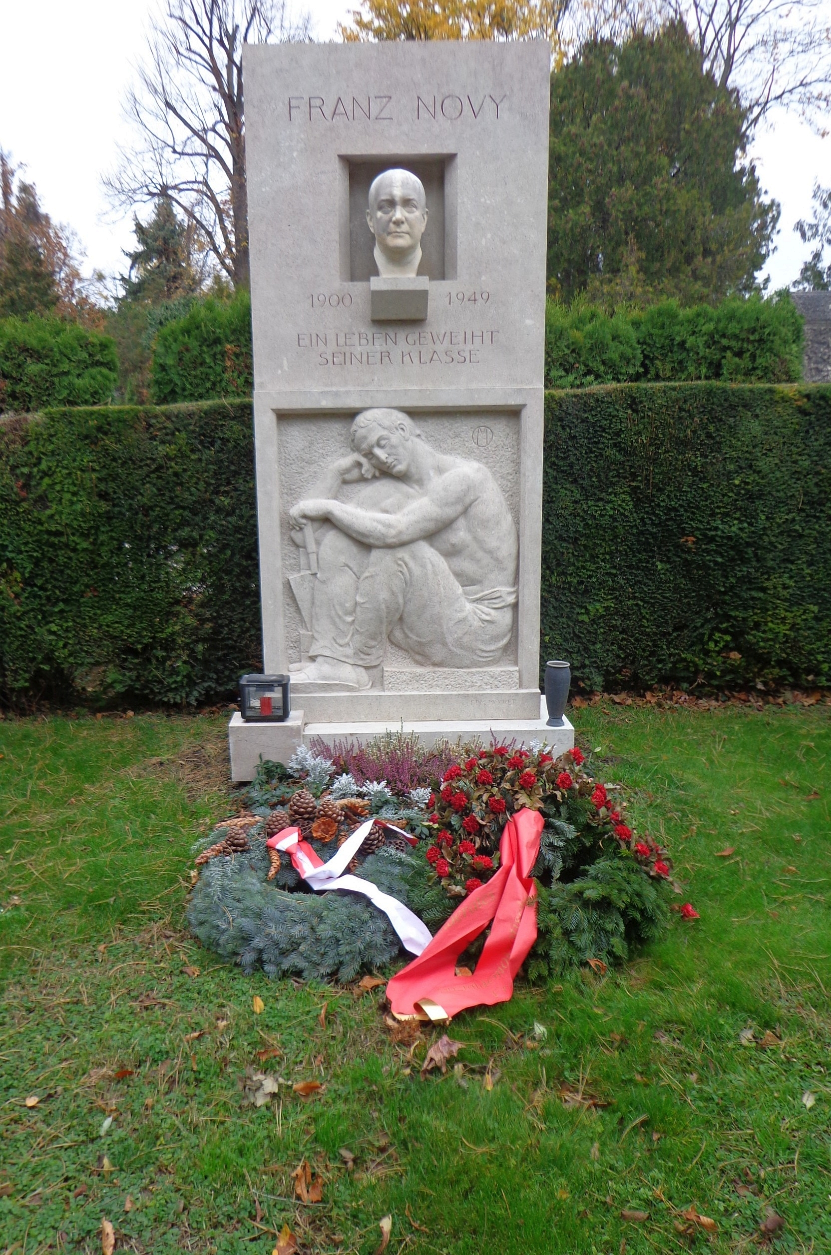 Wiener Zentralfriedhof - Gruppe 14C, Ehrengrab von Franz Novy